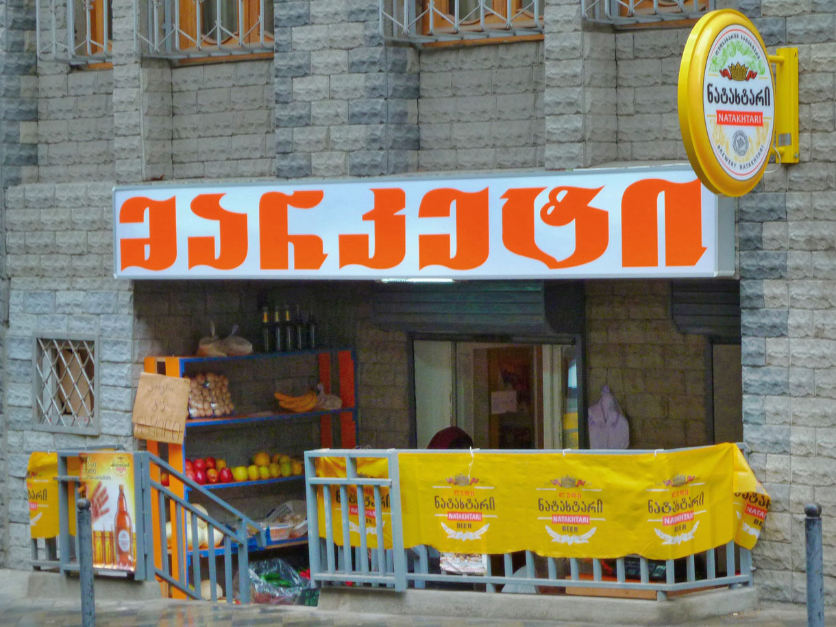 Dzweli Tbilisi